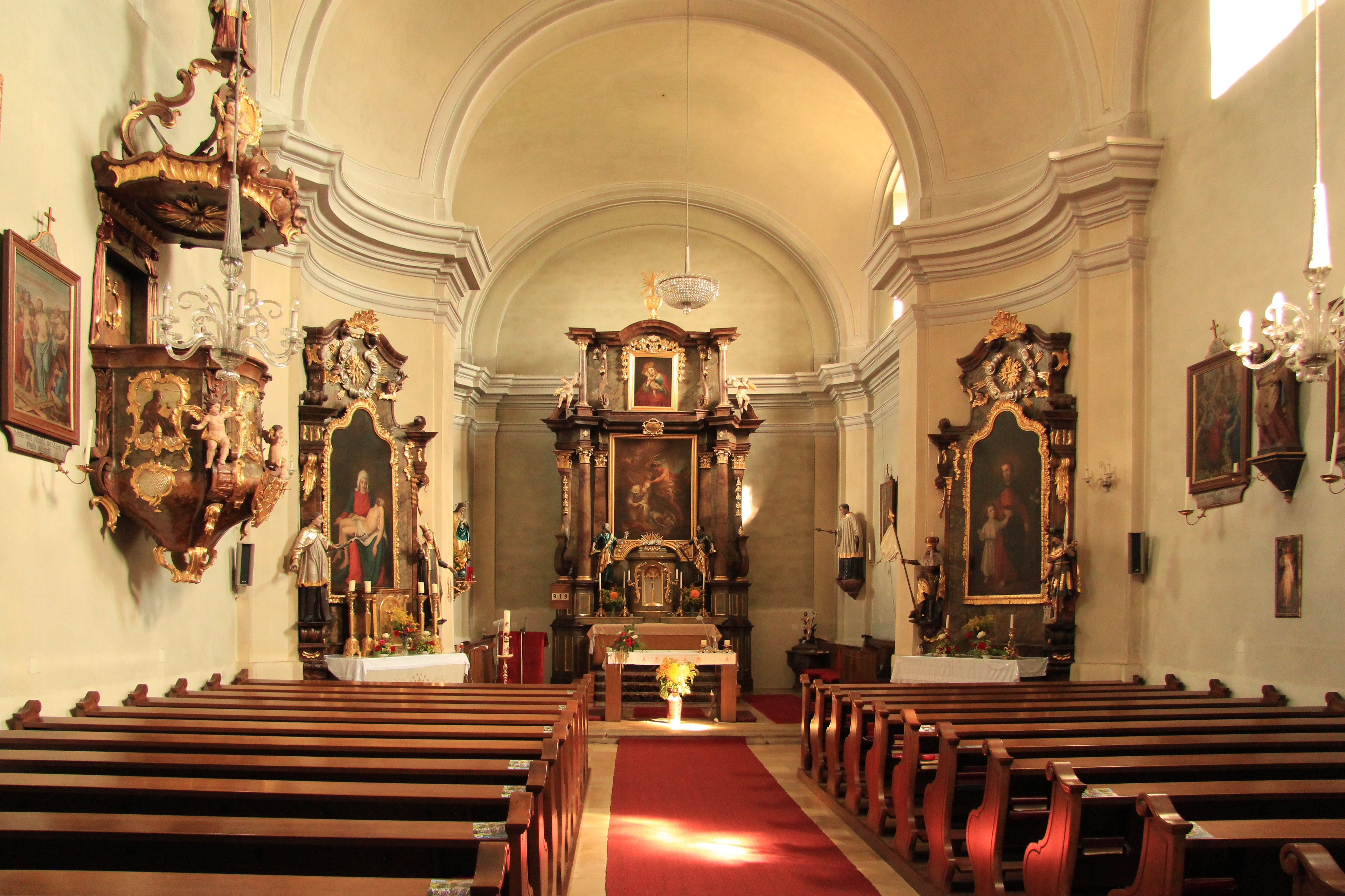 Kath. Pfarrkirche hl. Blasius und Kirchhof in Lehen